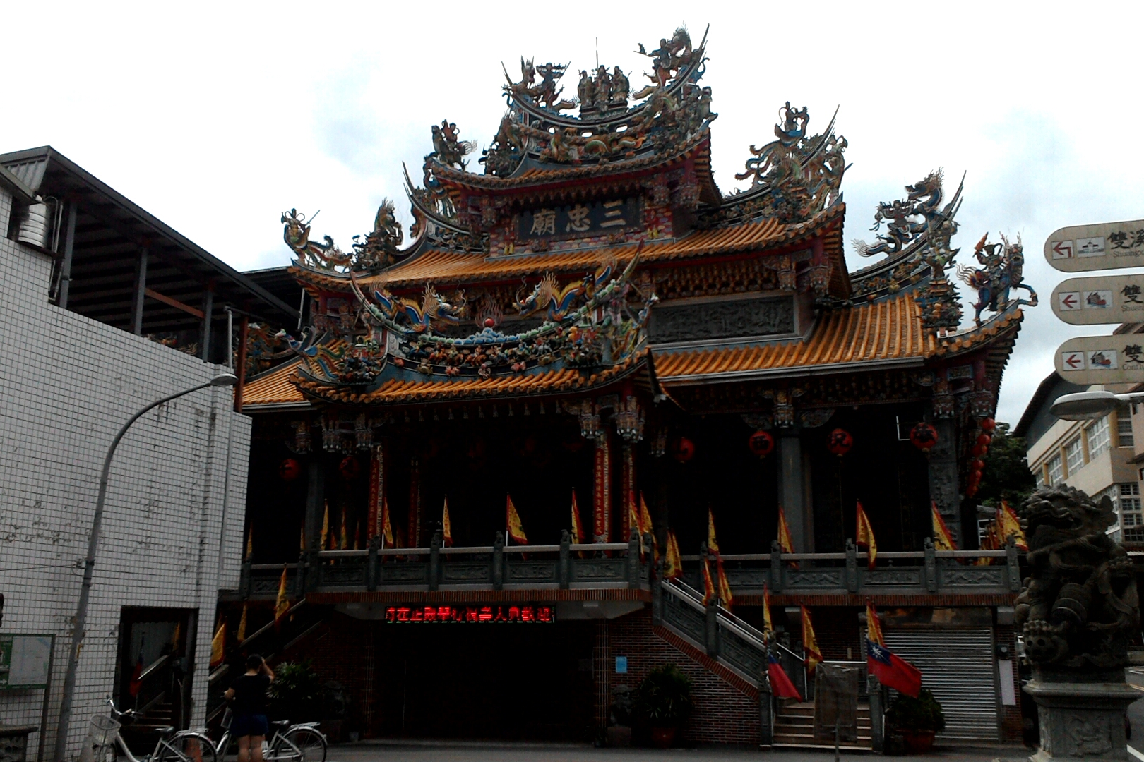 雙溪三忠廟,新北市雙溪區雙溪里